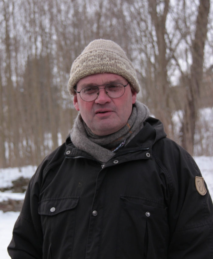 Thomas Westphalen, Archäologe, bei einer Führung im Kloster Grünhain